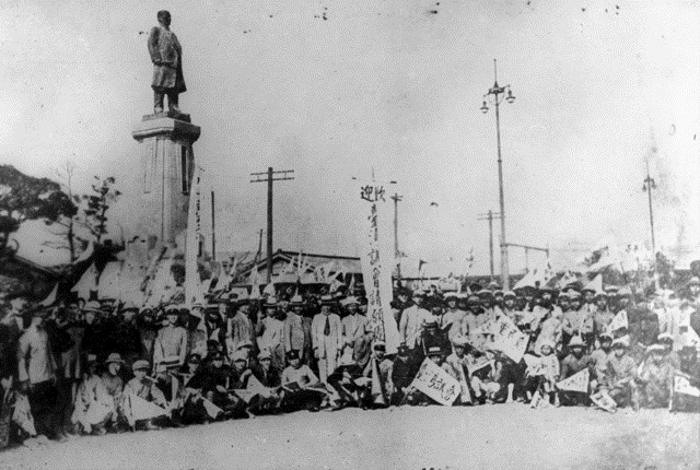 圖為1924年台灣議會請願團抵達東京時，與前來歡迎的台灣留學生合影。 Siòng-phìnn sī it kiú jī sù nî Tâi-uân Gī-huē tshíng-guān-thuân kàu Tang-kiann ê sî-tsūn, in kah lâi gîng-tsiap ê Tâi-uân liû-ha̍k-sing tsò-hué hip-siōng. 相片是1924年臺灣議會請願團到東京的時陣，怹佮來迎接的臺灣留學生做伙翕相。